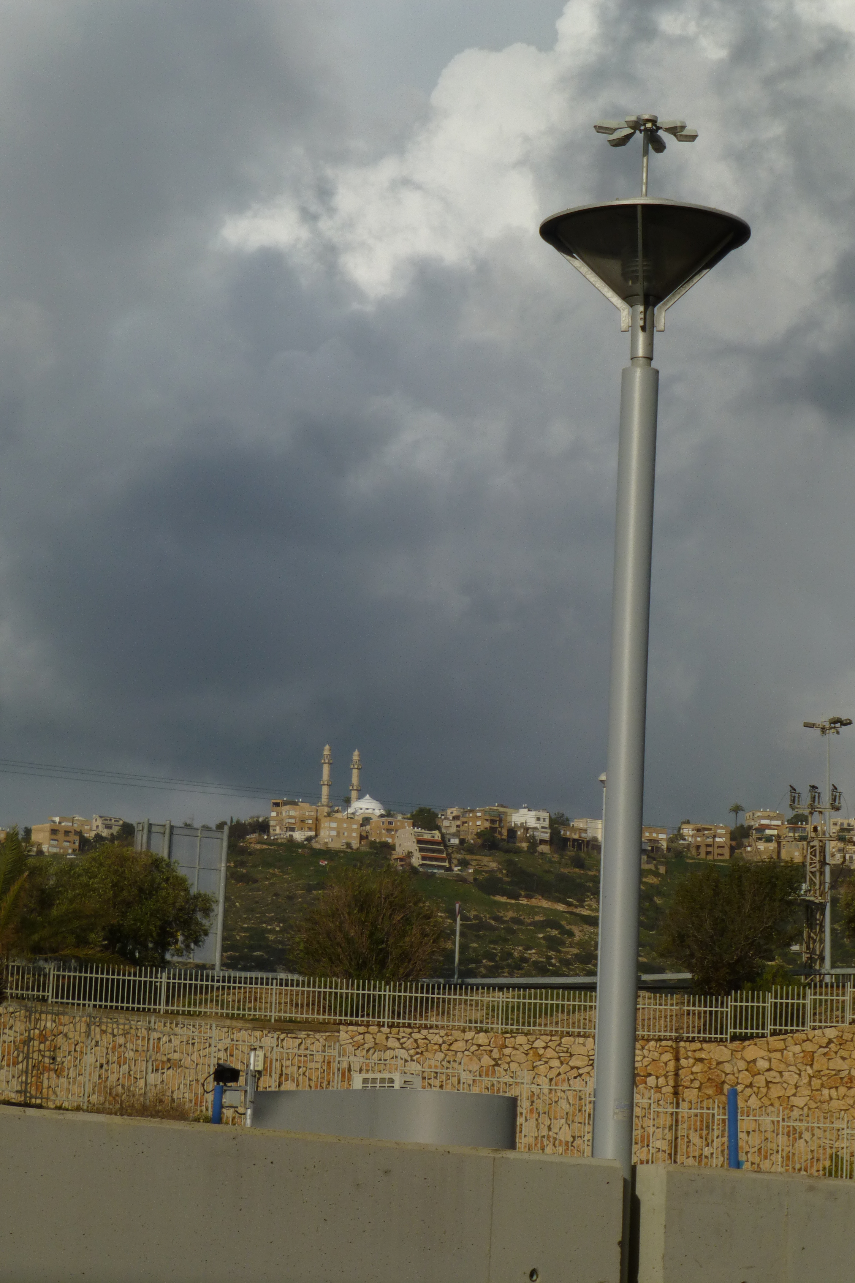 מסגד סיידנא מחמוד בשכונת כבביר בחיפה. מסגד זה משתייך לפלג האחמדים שנוסד בהודו ומטיף לנאורות, שלום ואהבה לאחר.